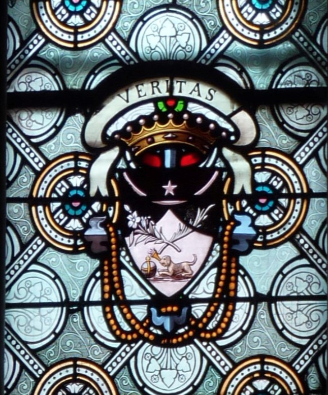 Vitrail avec le blason des dominicains et Veritas de la Chapelle Saint-Thomas Oullins